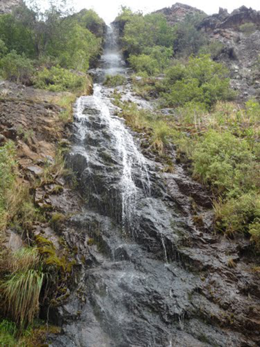 Según la tradición surgió de la roca, cuando Santo Toribio en su larga caminata, teniendo sed mucha sed golpeó con su bastón